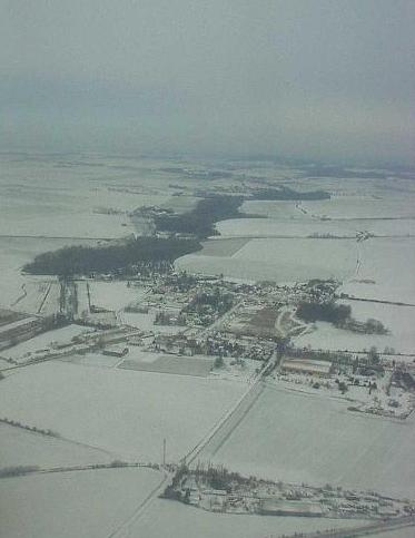 Thieux (Marne) Photo personnelle de TILMAN KLUGE 3/2005